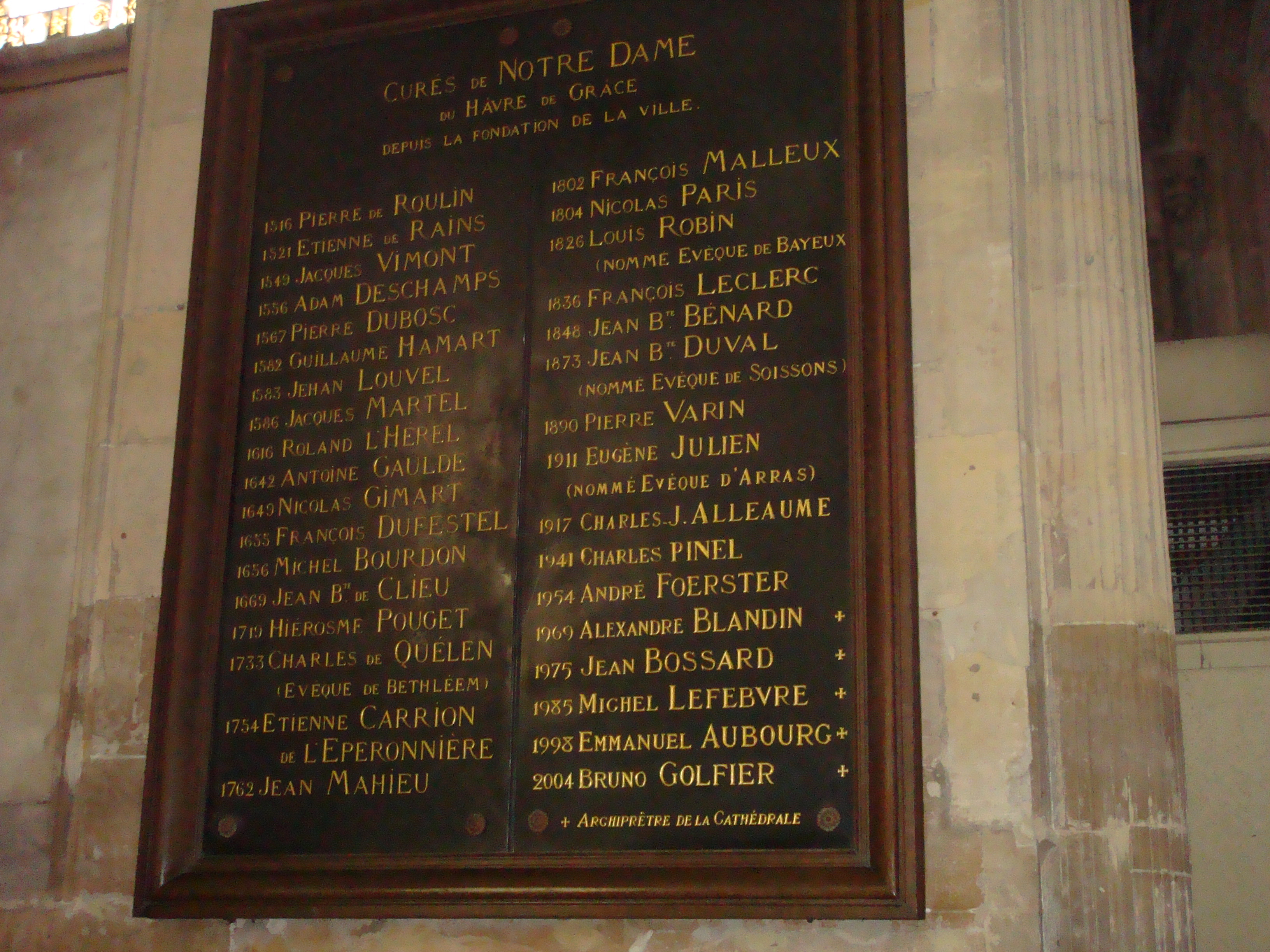 Liste des curés, gravé dans une plaque dans le bas-côté sud à côté de l'autel privilégié.